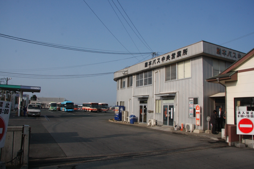 熊本バス中央営業所